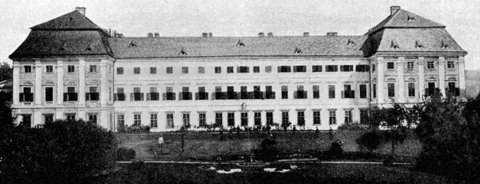 Zámek Horní Dlouhá Loučka